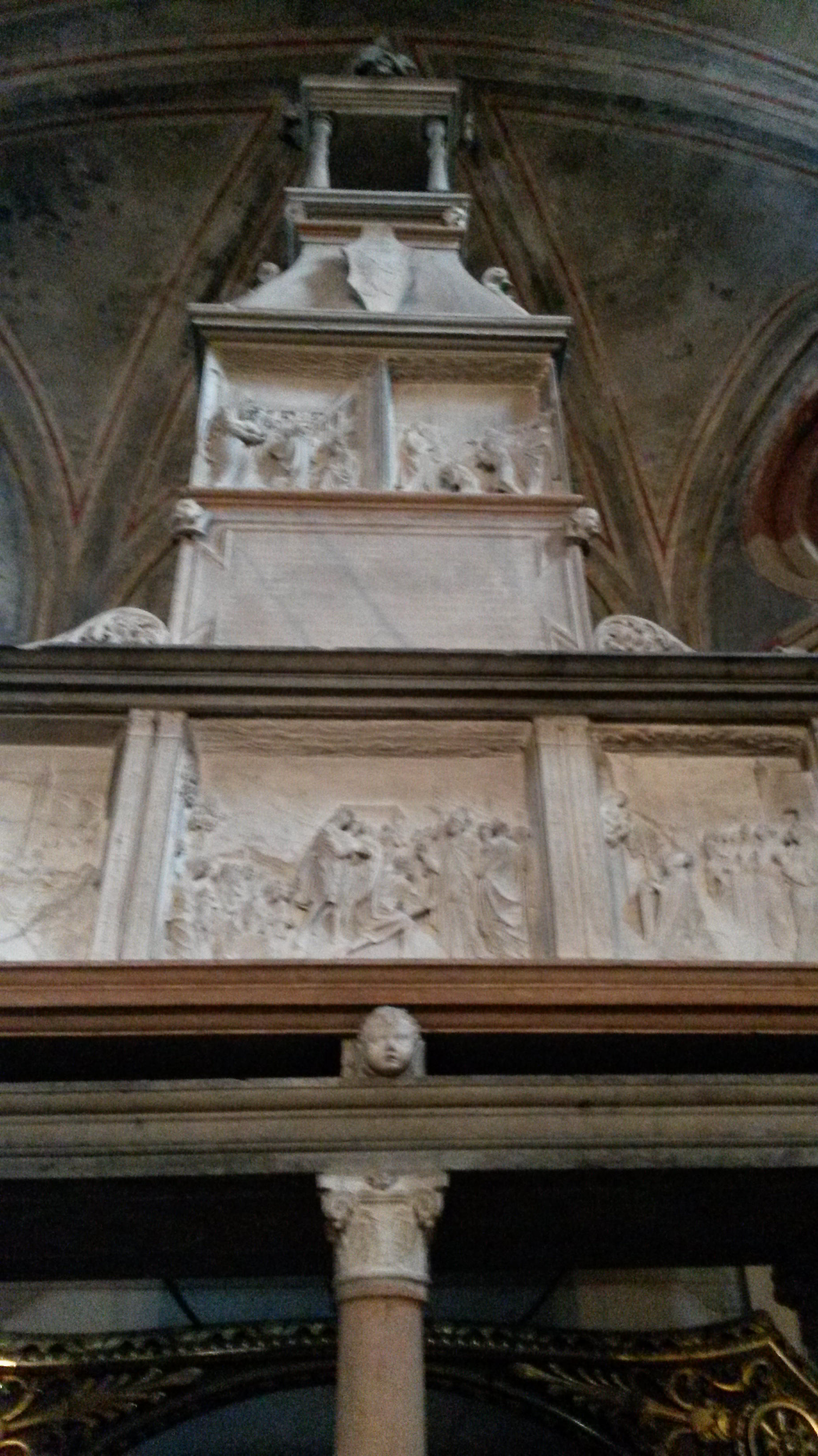 Monastero romanico di San Lanfranco (Pavia), arca rinascimentale di San Lanfranco, dello scultore lombardo Giovanni Antonio Amadeo